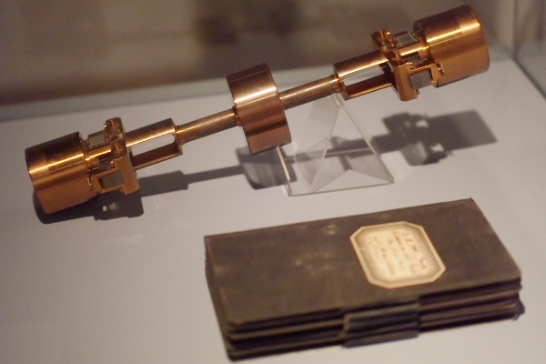 Horizontalpendel von Oskar Hecker, gebaut in der Werkstatt von P. Stückrath in Berlin (1897), Exponat der Ausstellung 2017 vom GeoForschungsZentrum Potsdam